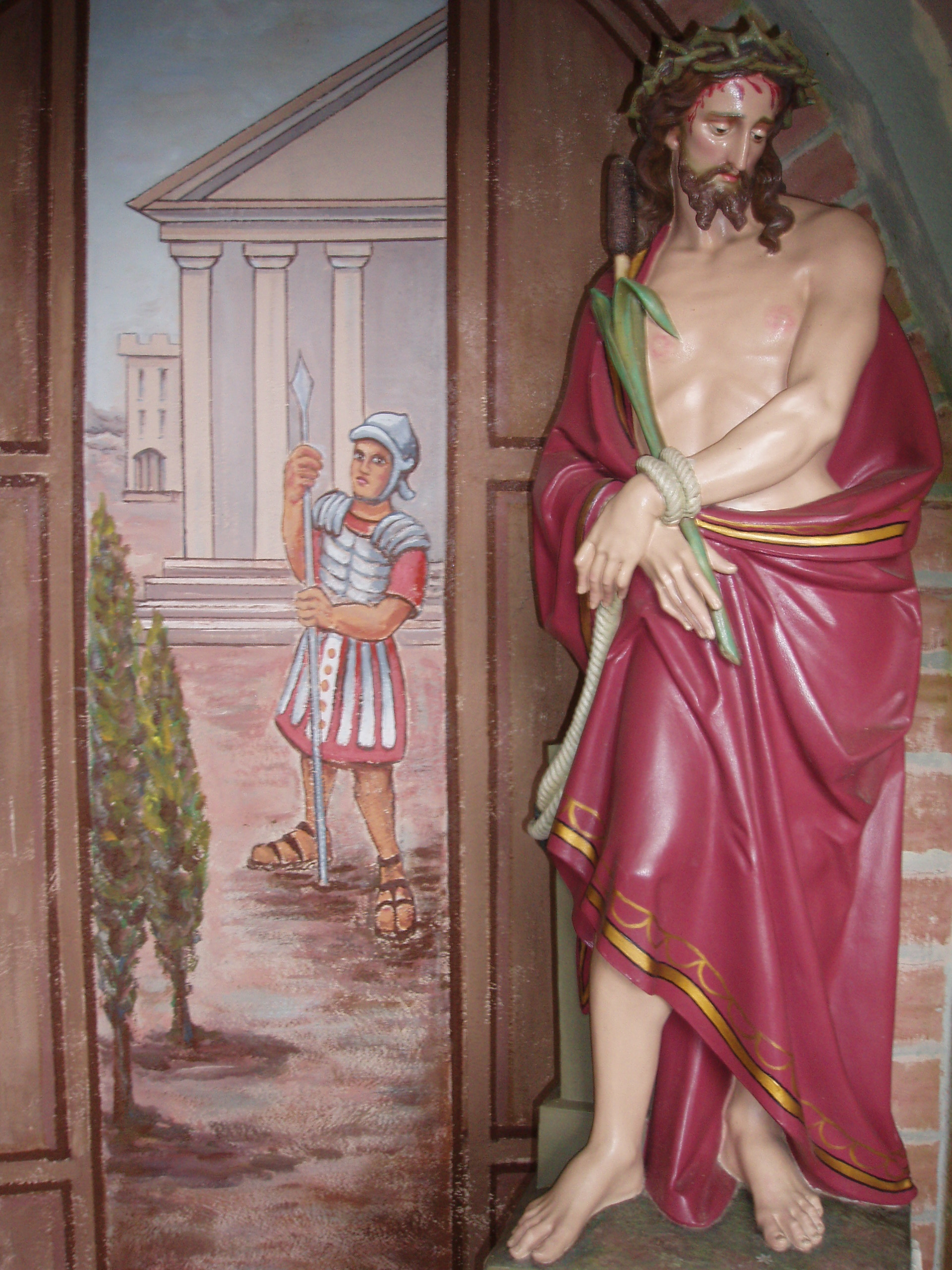 Heiligenverehrung in Schömberg